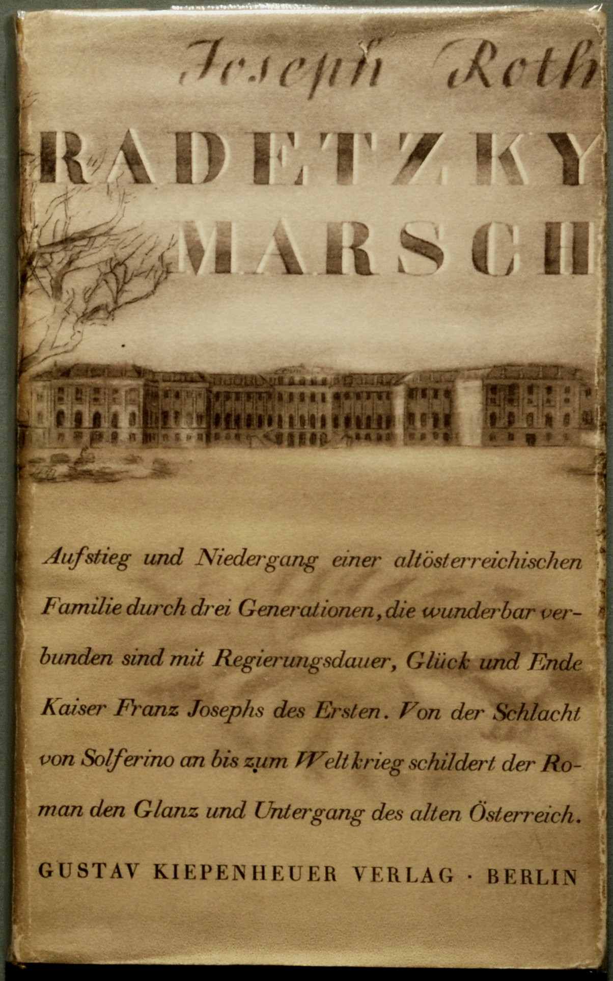 Roth, Joseph: Radetzkymarsch. Roman. Erstausgabe. Verlagsumschlag in Klarsichtfolie eingelegt. Berlin: Kiepenheuer & Witsch 1932, 582 Seiten